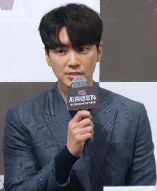 1일 오후 서울 강남구 임피리얼팰리스 서울에서 열린 tvN 드라마 '60일,지정생존자' 제작발표회에서 배우들이 포즈를 취하고 있다.